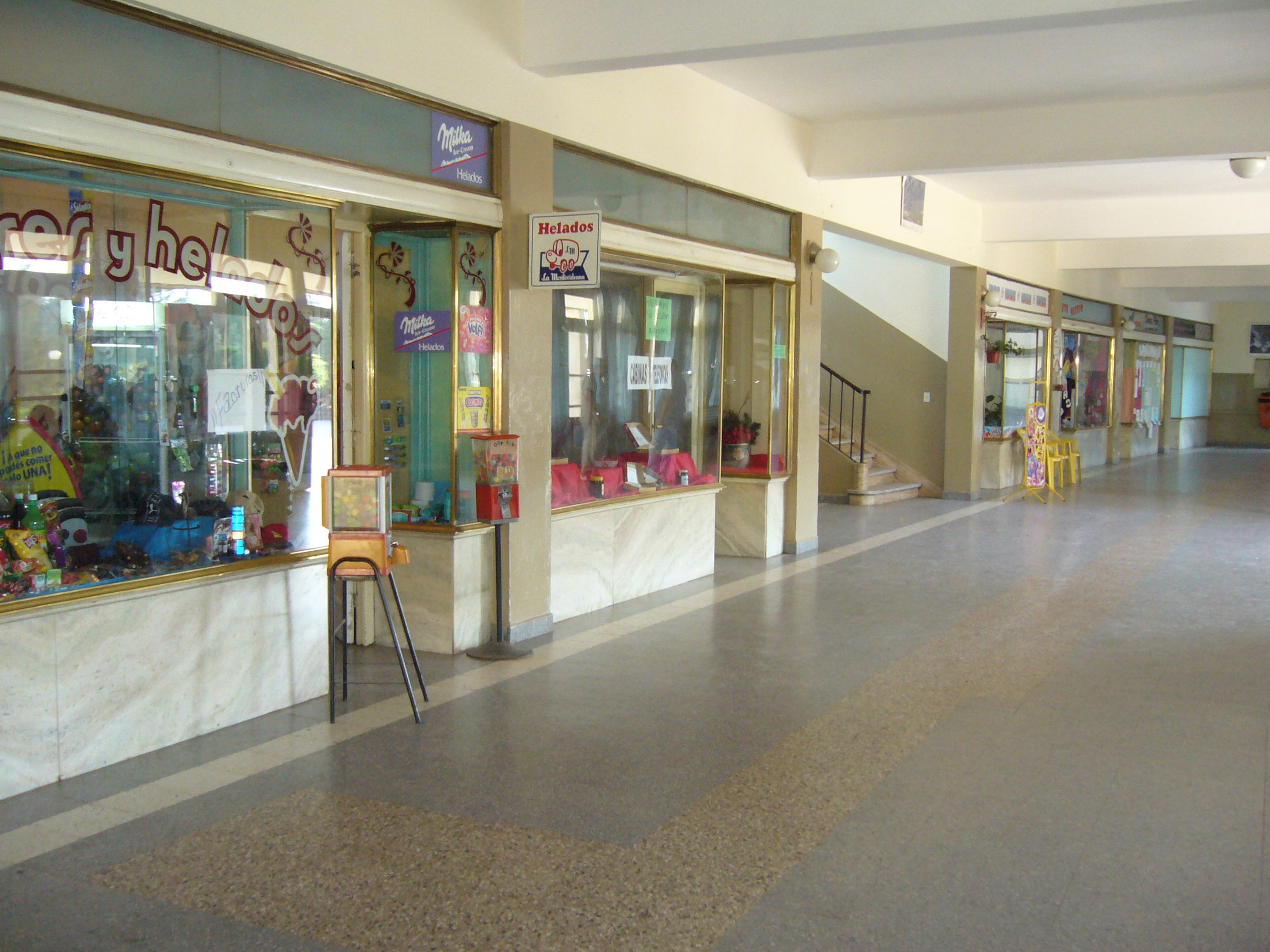 Vista interior de los locales comerciales del Hotel N˚ 2 en 2009 Unidad Turística Embalse Córdoba Argentina